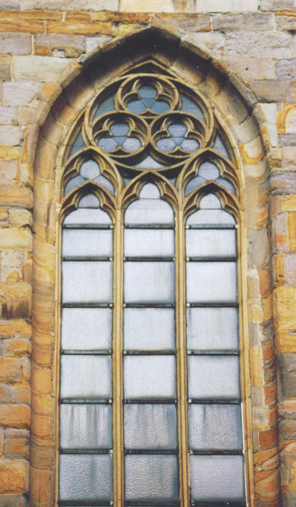 Maßwerkfenster an der Südseite der St. Petri-Kirche in Dortmund